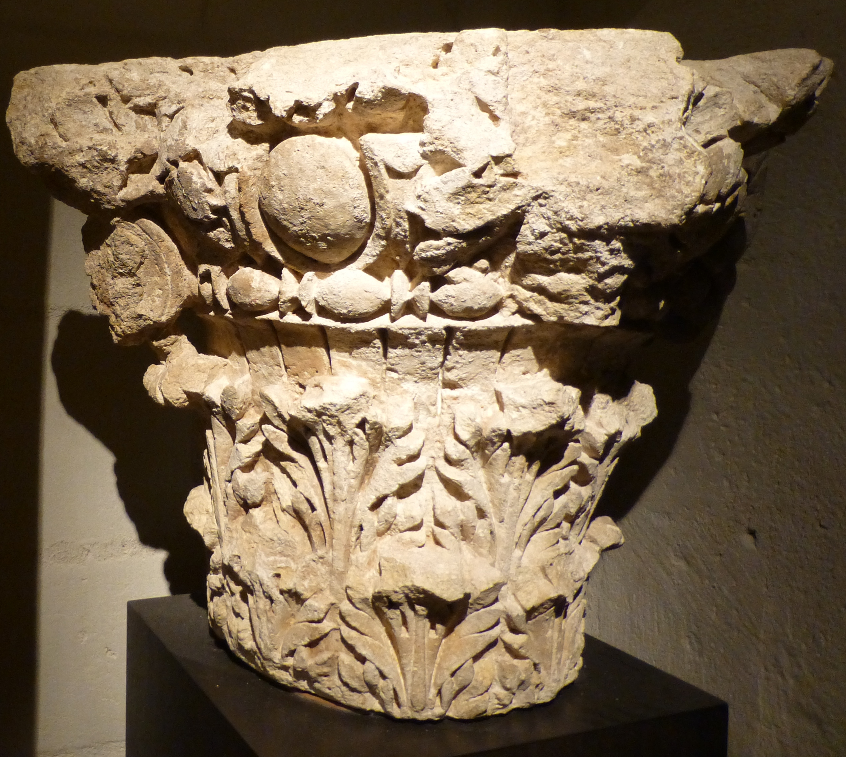 Angers, Musée des Beaux-Arts, Juliomagus : chapiteau composite en calcaire de la 1ère moitié du II° siècle, trouvé en réemploi dans les fondations de la Tour Toussaint en 1974.